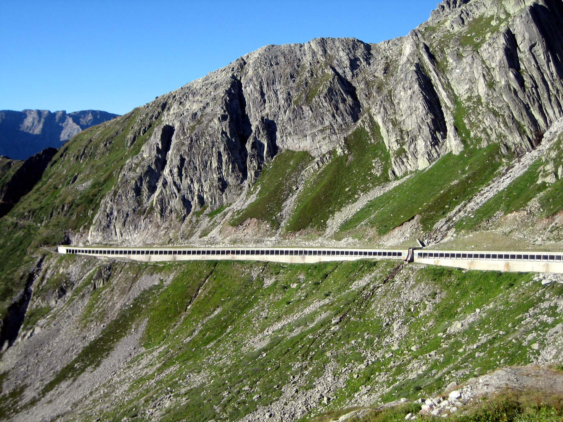 Galerie südlich des Hospiz